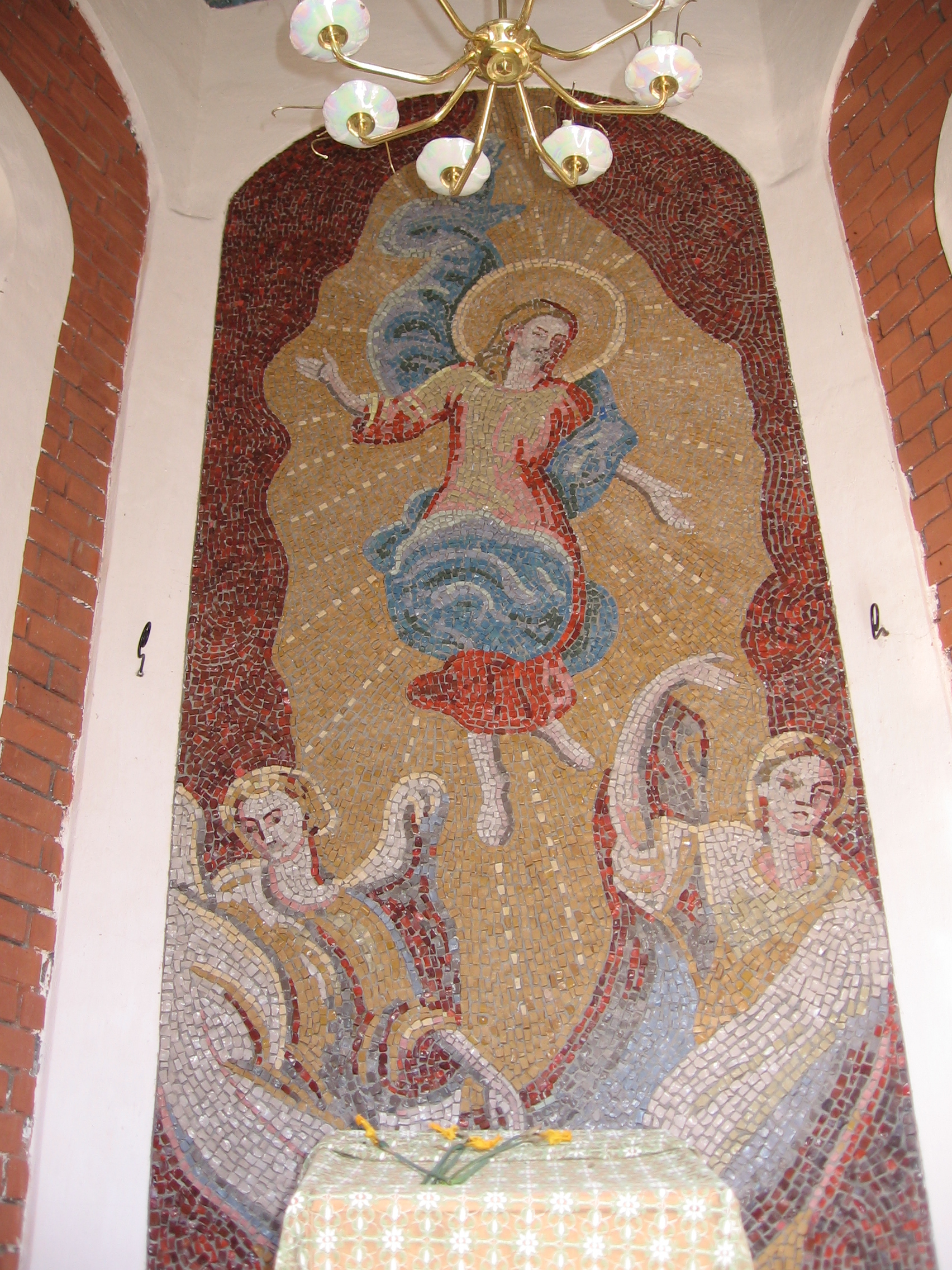 Беларуская (тарашкевіца): Капліца на месцы бітвы 1812 году (Паддубна). Мазаічнае пано. This is a photo of Belarusian heritage monument. Reference number: 113Г000631 ( WLM)